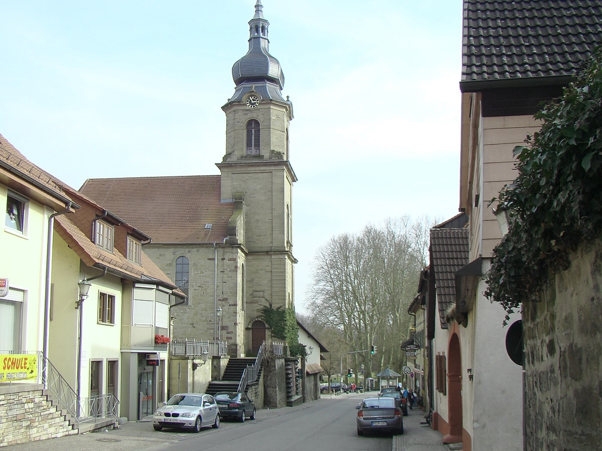 Hauptstraße in Angelbachtal-Eichtersheim